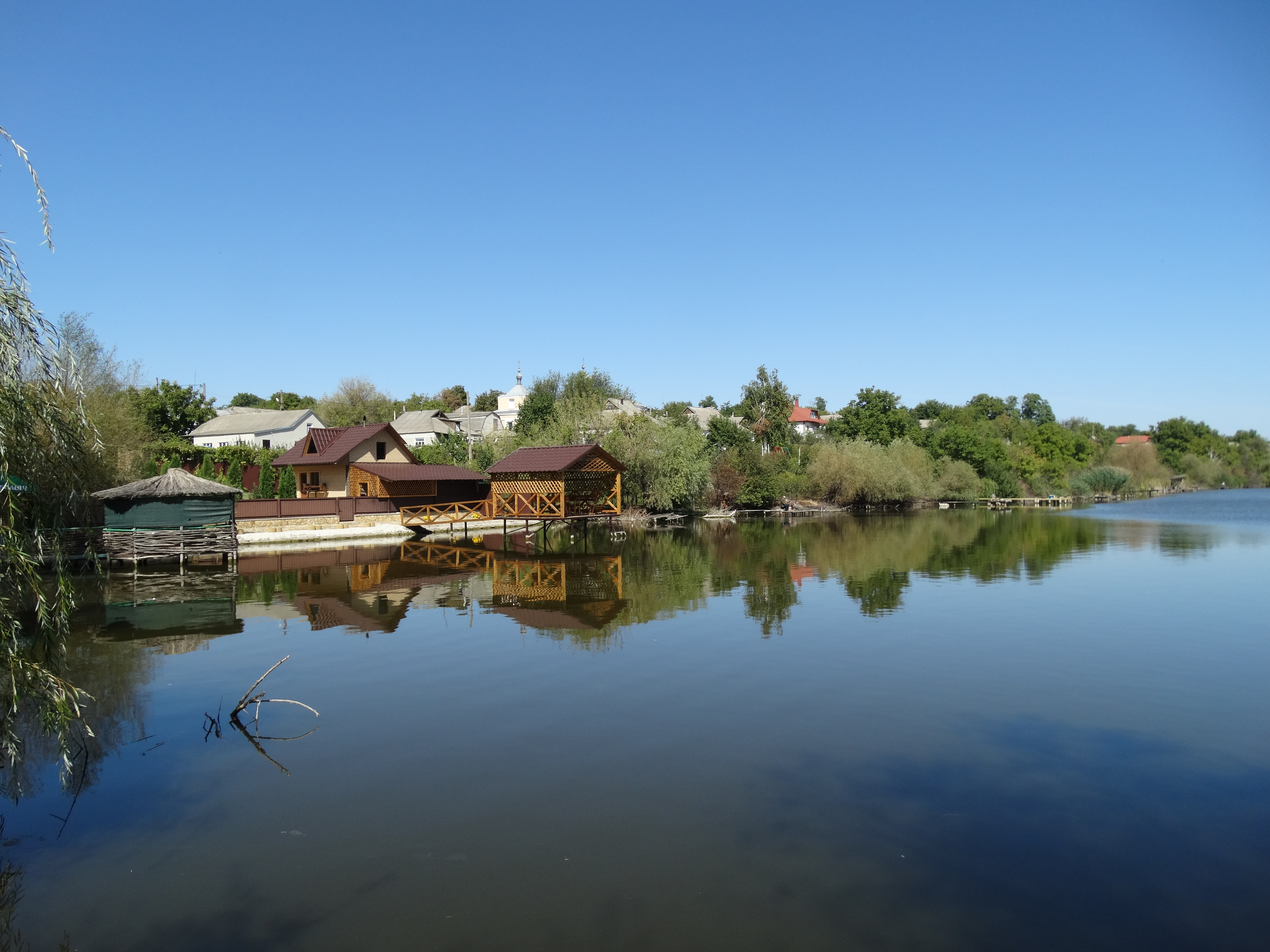 Окнянське водосховище на річці Ягорлик; смт Окни, Одеська область. Вікіекспедиція на північ Одещини